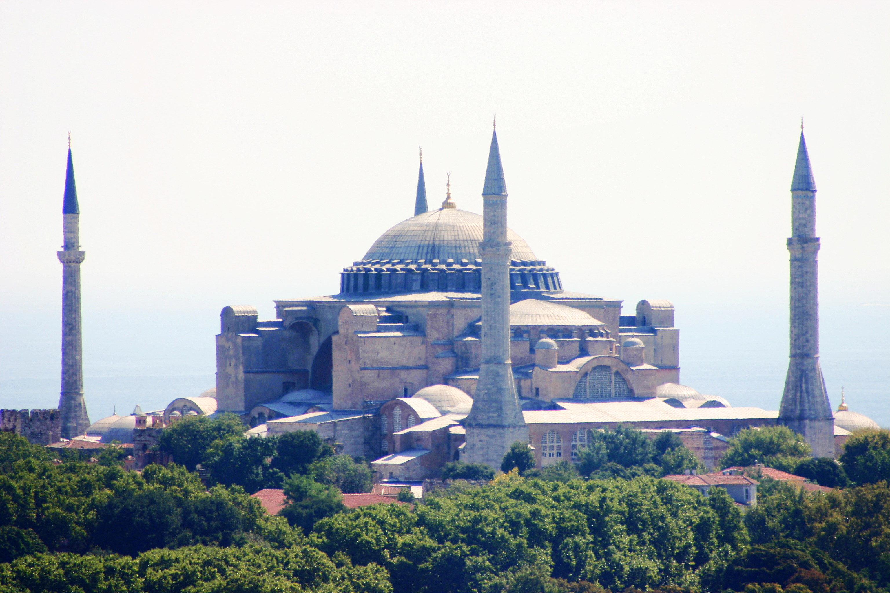 Vista de Hagia Sophia a partir da Torre Gálata